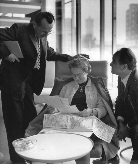 Zentralbild Franke 2.11.1966 Berlin: Bruno Apitz im Pausengespräch während der Jahreskonferenz des DSV Stoff zu Pausengesprächen - hier zwischen Bruno Apitz (links) und Franz Hammer (rechts) und Gattin aus Taberz - hatte bereits der erste Beratungstag der 1. Jahreskonferenz des Deutschen Schriftstellerverbandes gegeben. Über 350 Delegierte und Gäste beraten vom 2. bis 4.11.1966 in der Kongreßhalle am Berliner Alexanderplatz über die Entwicklung der sozialistischen Nationalliteratur.